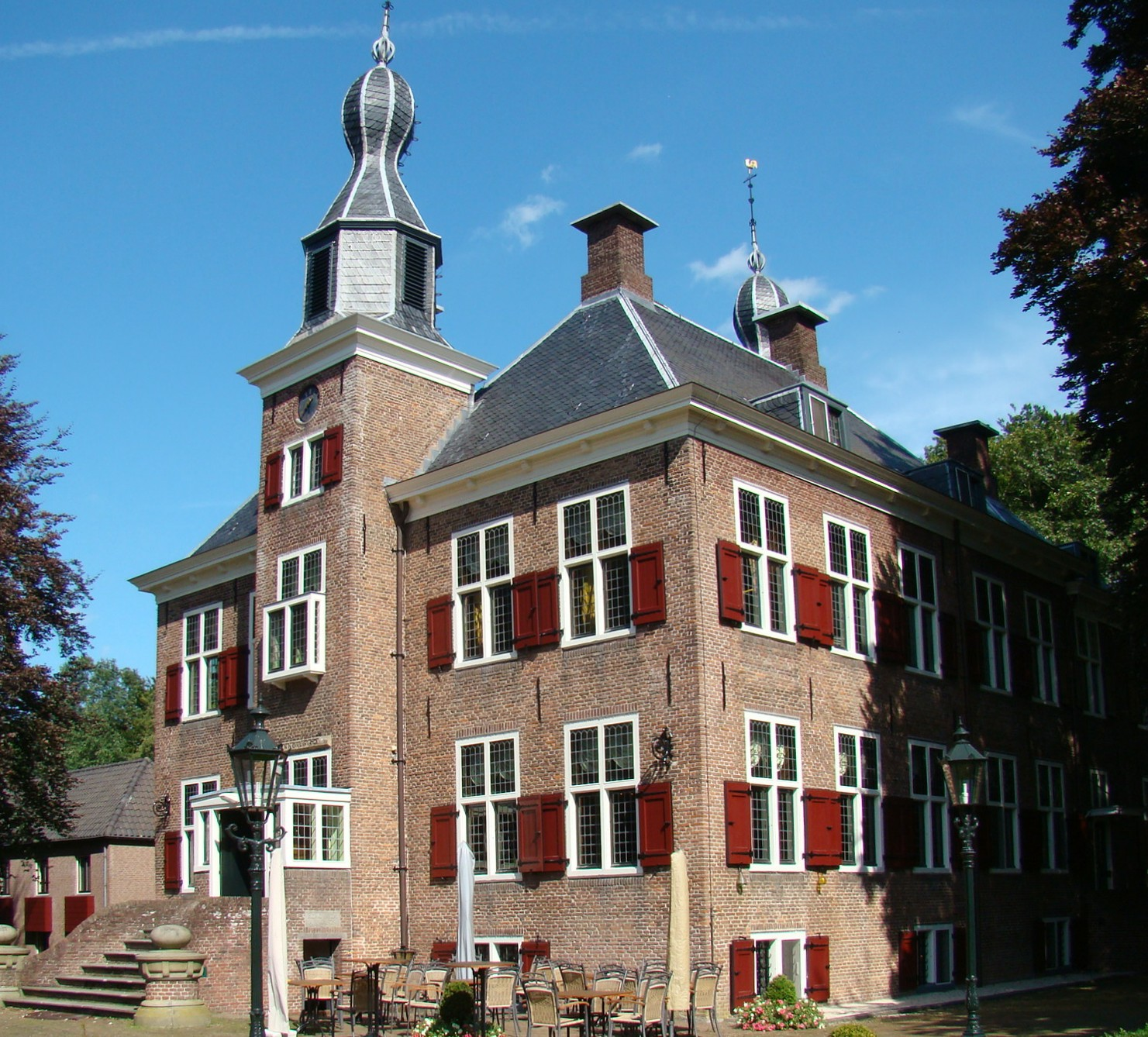 Kasteel de Essenburgh, Castle Essenburgh